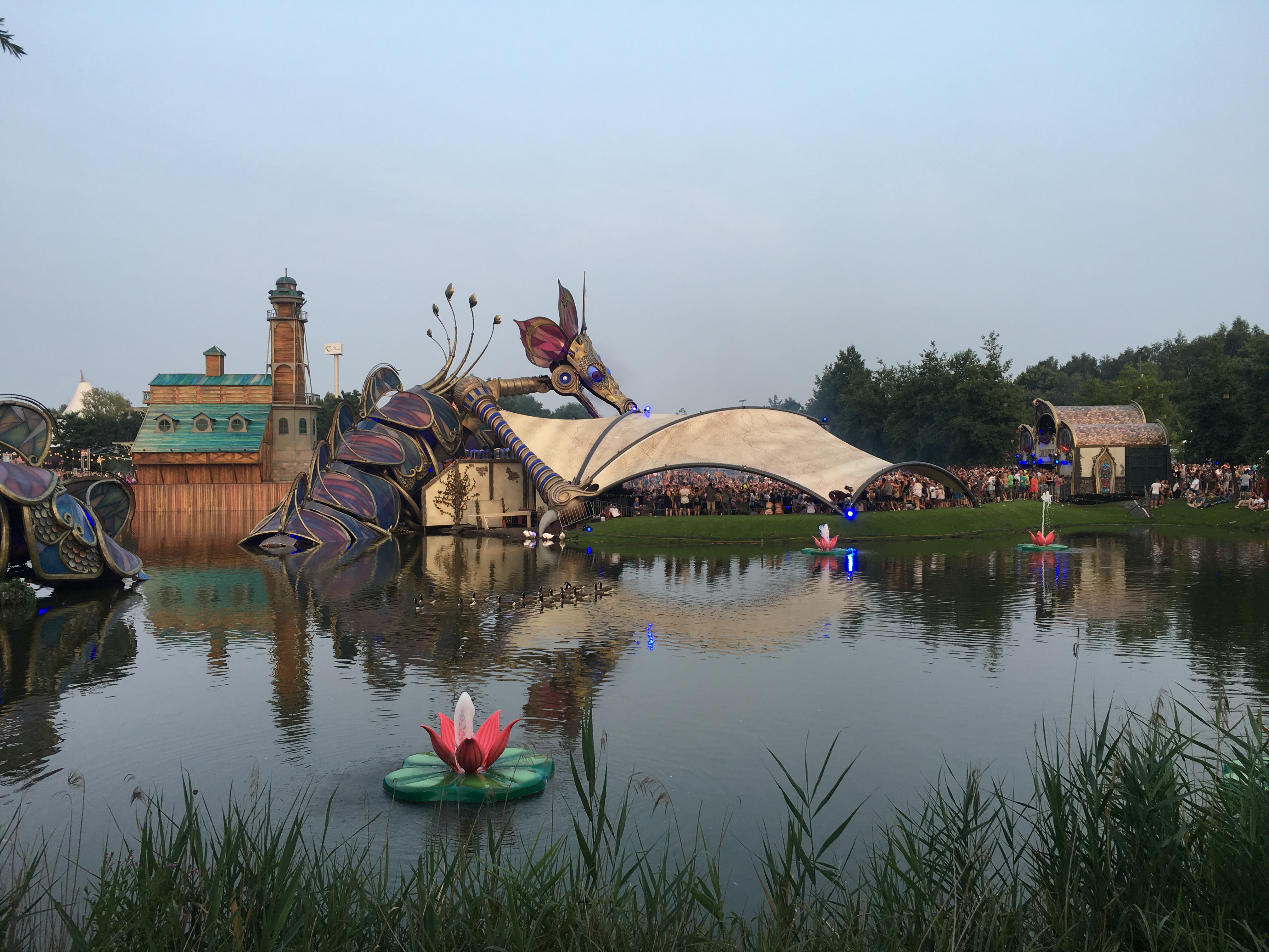 Une des scènes du festival Tomorrowland (juillet 2016, Belgique)